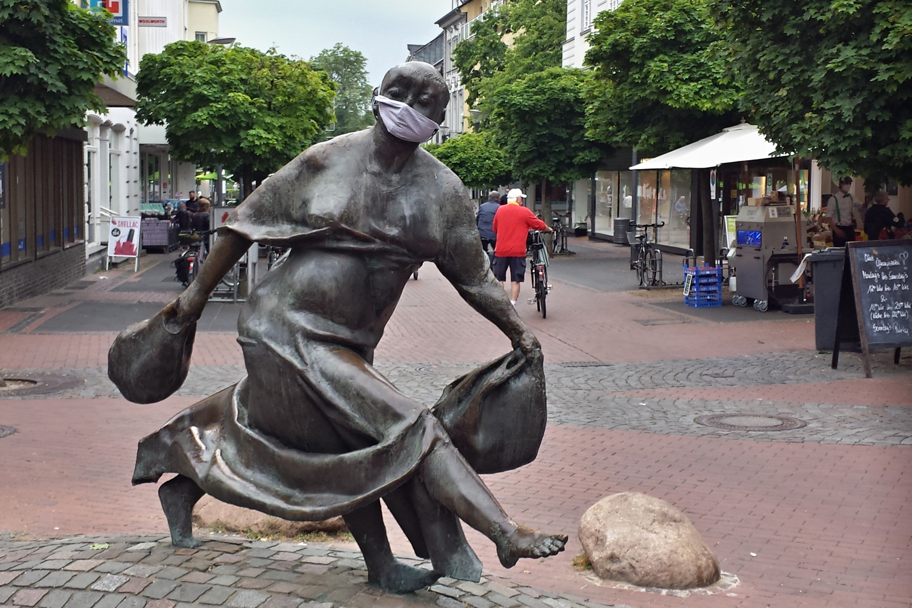 Eilige Einkäuferin in Hilden, Mittelstraße. Eine Bronzeskulptur von Karl-Henning Seemann während der Corona-Pandemie 2020